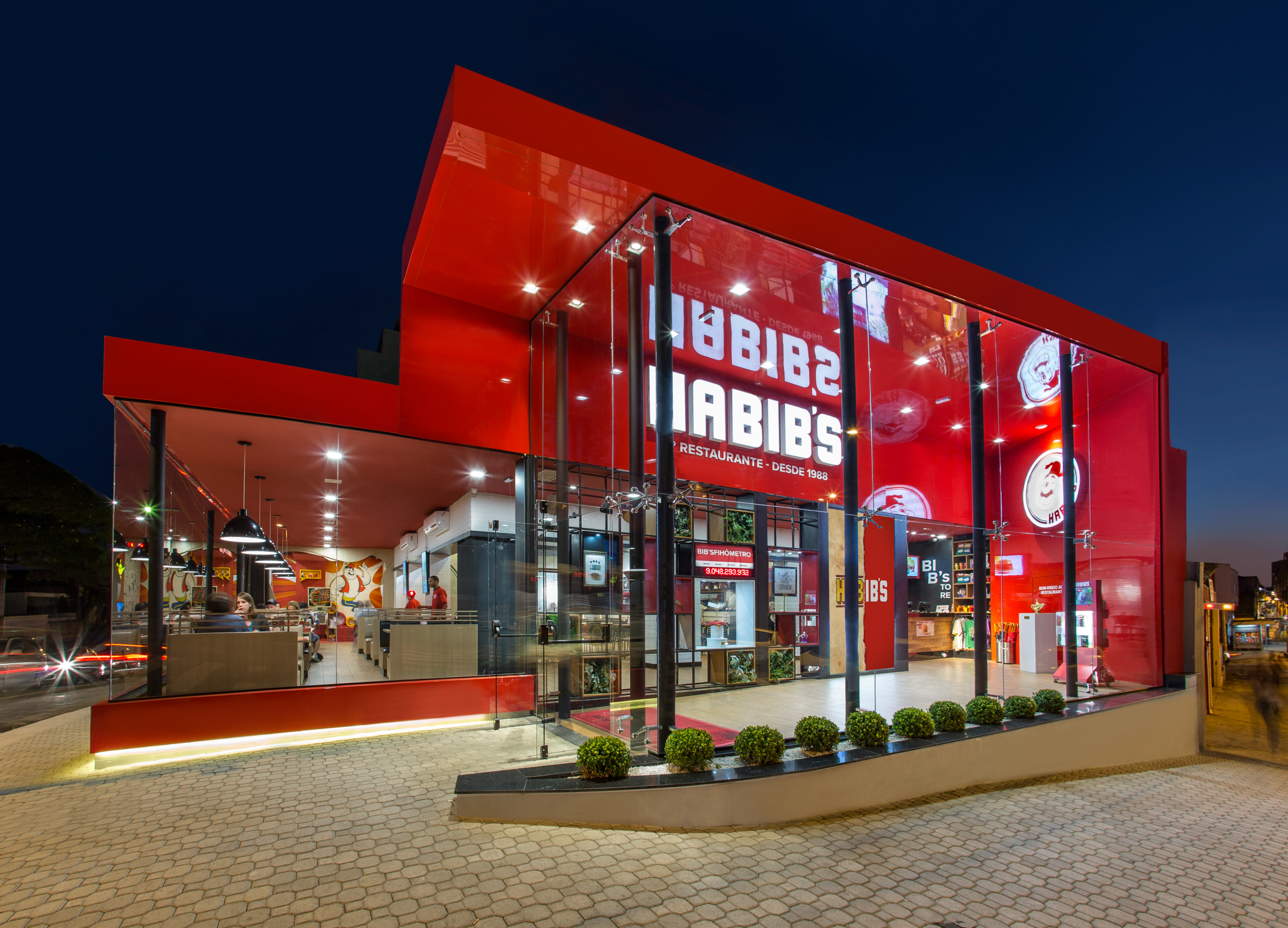 Primeira loja, 1988. Rua Cerro Corá, Lapa, São Paulo, Brasil.